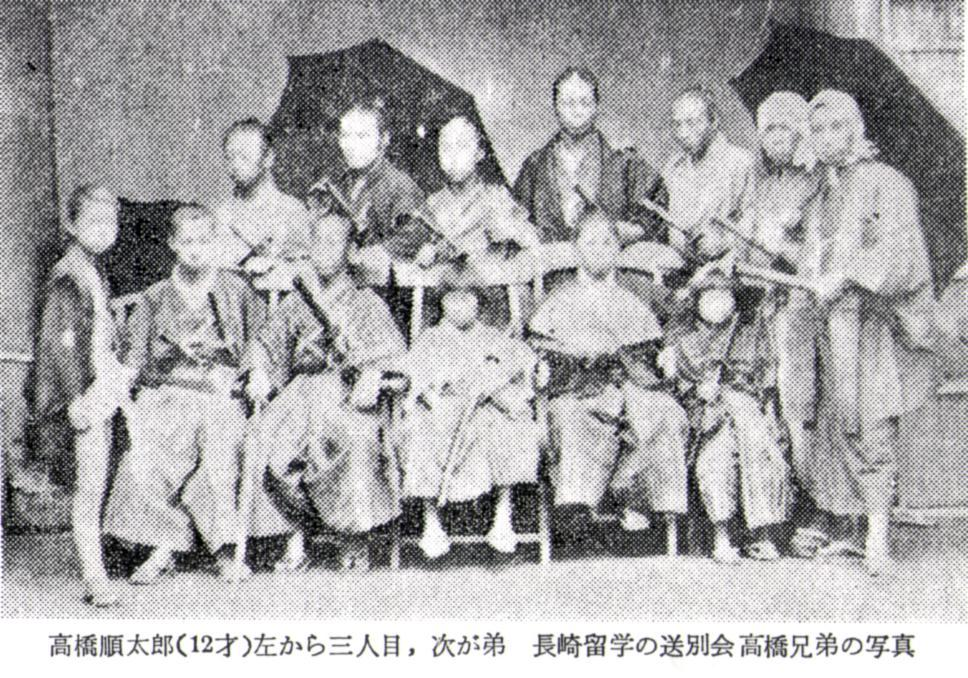 髙橋順太郎（12歳）左から3番目、次が直次郎（順太郎の弟） 長崎留学の歓送迎会、髙橋兄弟の写真 （慶応三年頃）